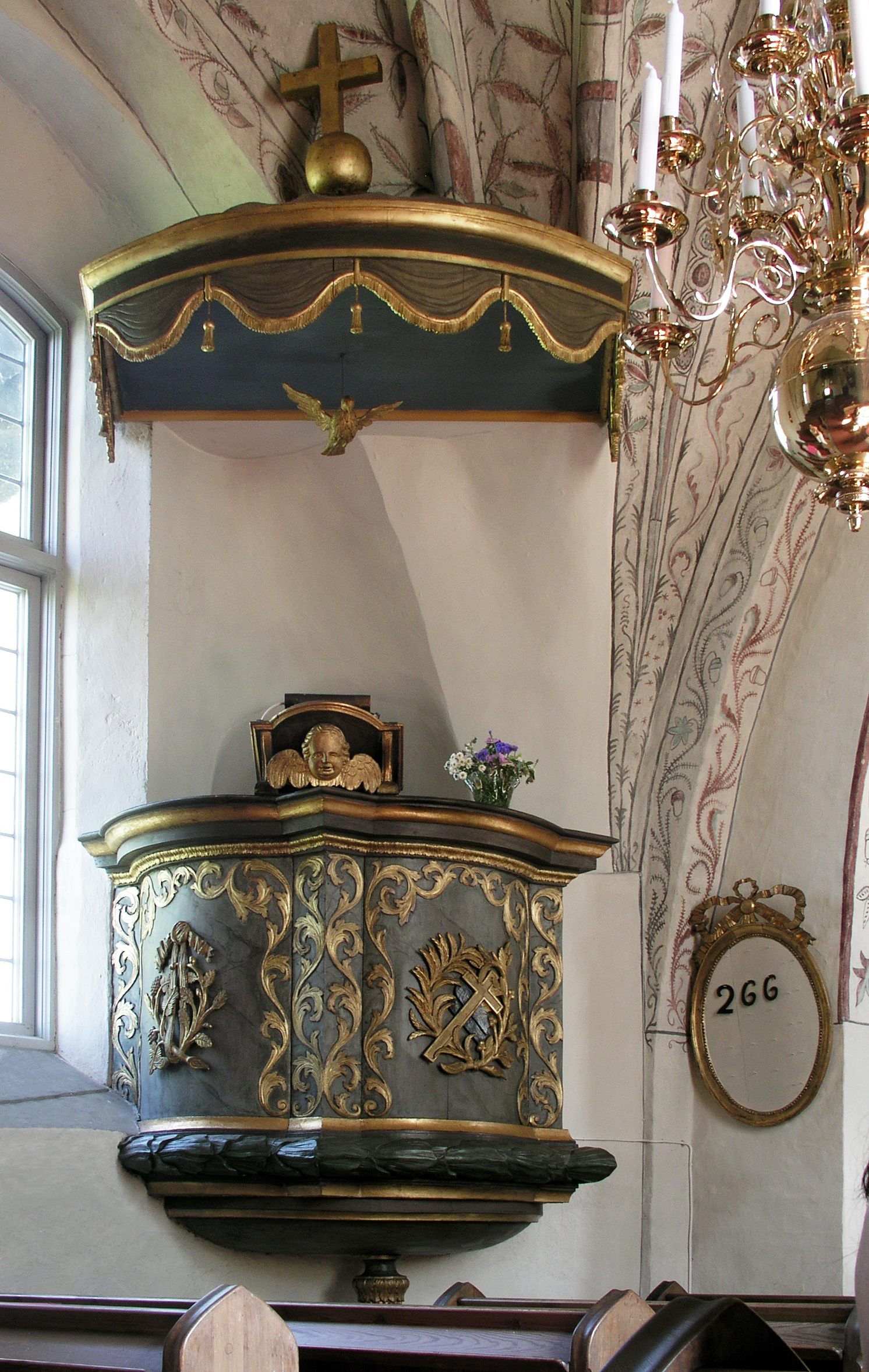 Kaga kyrka / Kaga church. Linköping, Sweden. Pulpit.